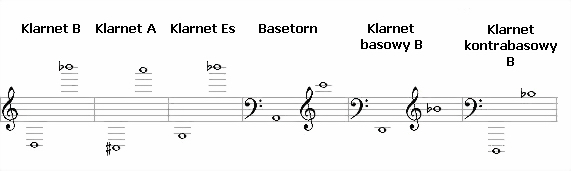 Диапазоны разновидностей кларнета